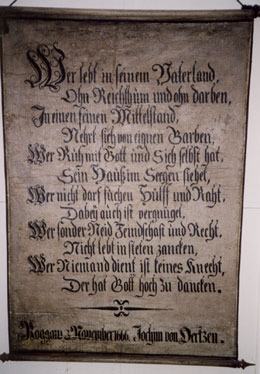 Historischer Wandspruch im Herrenhaus Roggow bei Rerik (M-V) Datum: 1666 Urheber: J. von Oertzen Quelle: Bildadresse